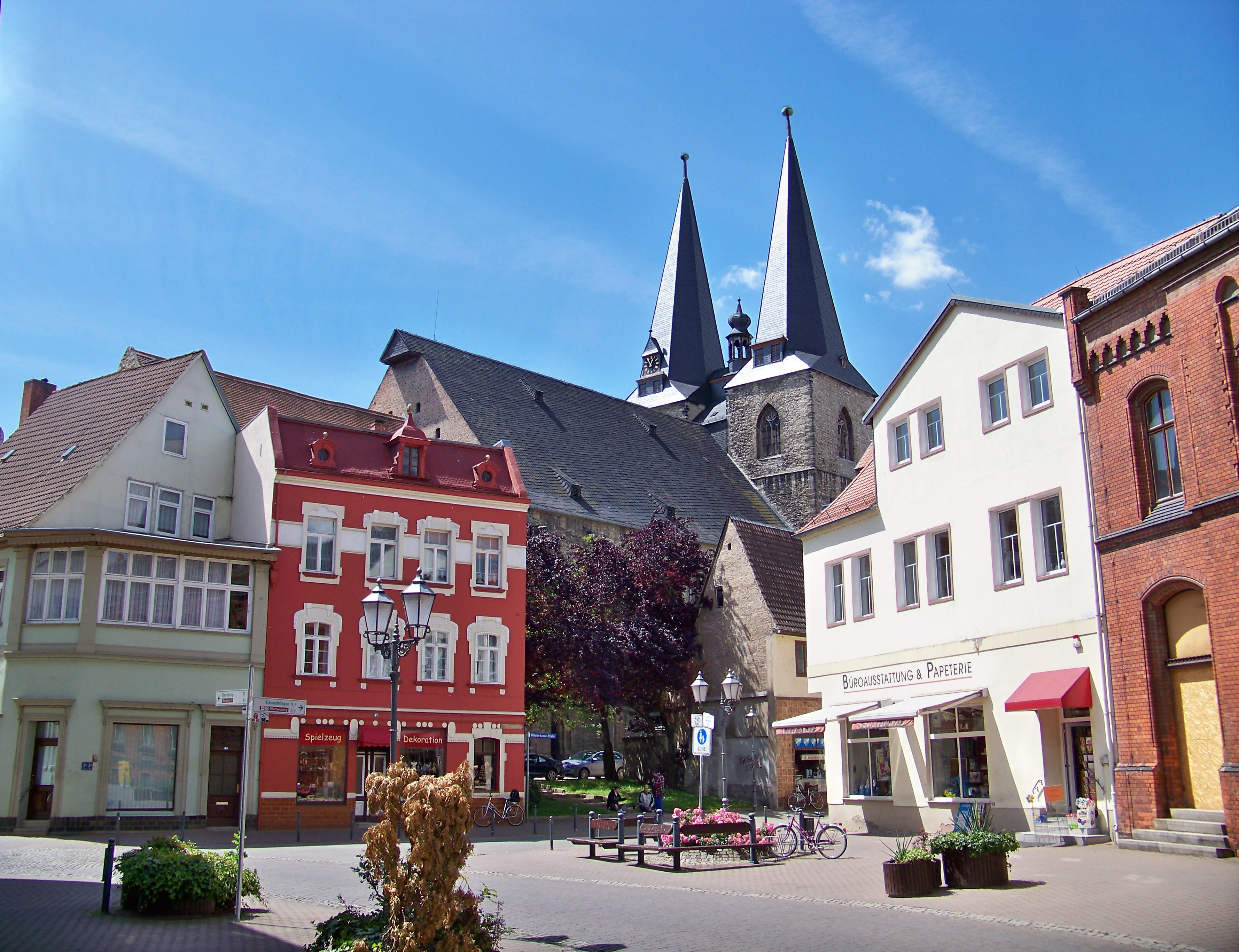 Kirche St. Staphani in Calbe (Saale)